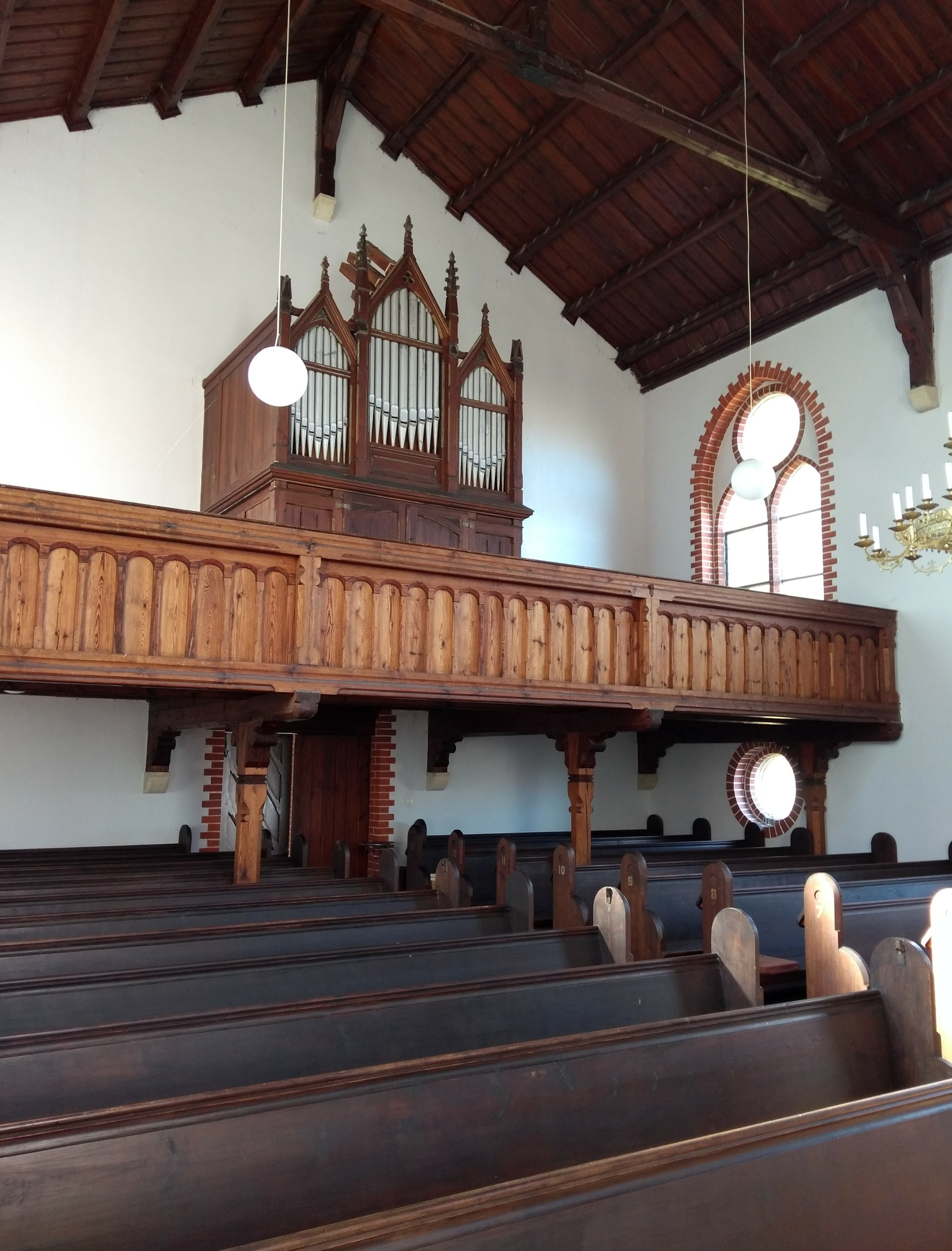 Empore und Orgel der Dorfkirche Bornow der Stadt Beeskow in Brandenburg.